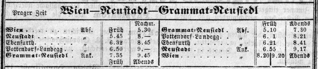 Fahr-Ordnung der Eisenbahn Wien–Wiener Neustadt–Grammatneusiedl